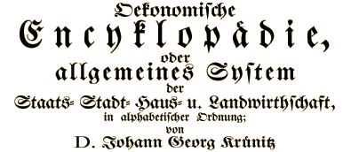 Titelschriftzug Krünitz "Oekonomische Encyklopädie, oder allgemeines System der Stadt- Haus- und Landwirthschaft, in alphabetischer Ordnung" (1773–1858)